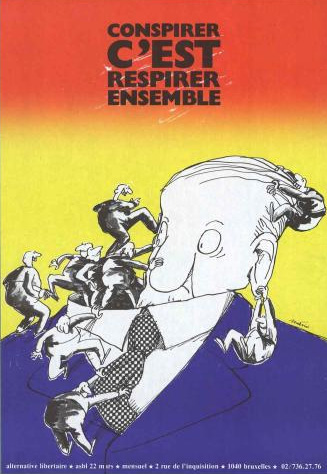 Conspirer, c’est respirer ensemble une affiche Alternative libertaire mensuel (Bruxelles) - éditions asbl 22-Mars (Bruxelles) avec un dessin de Mario, 1984.